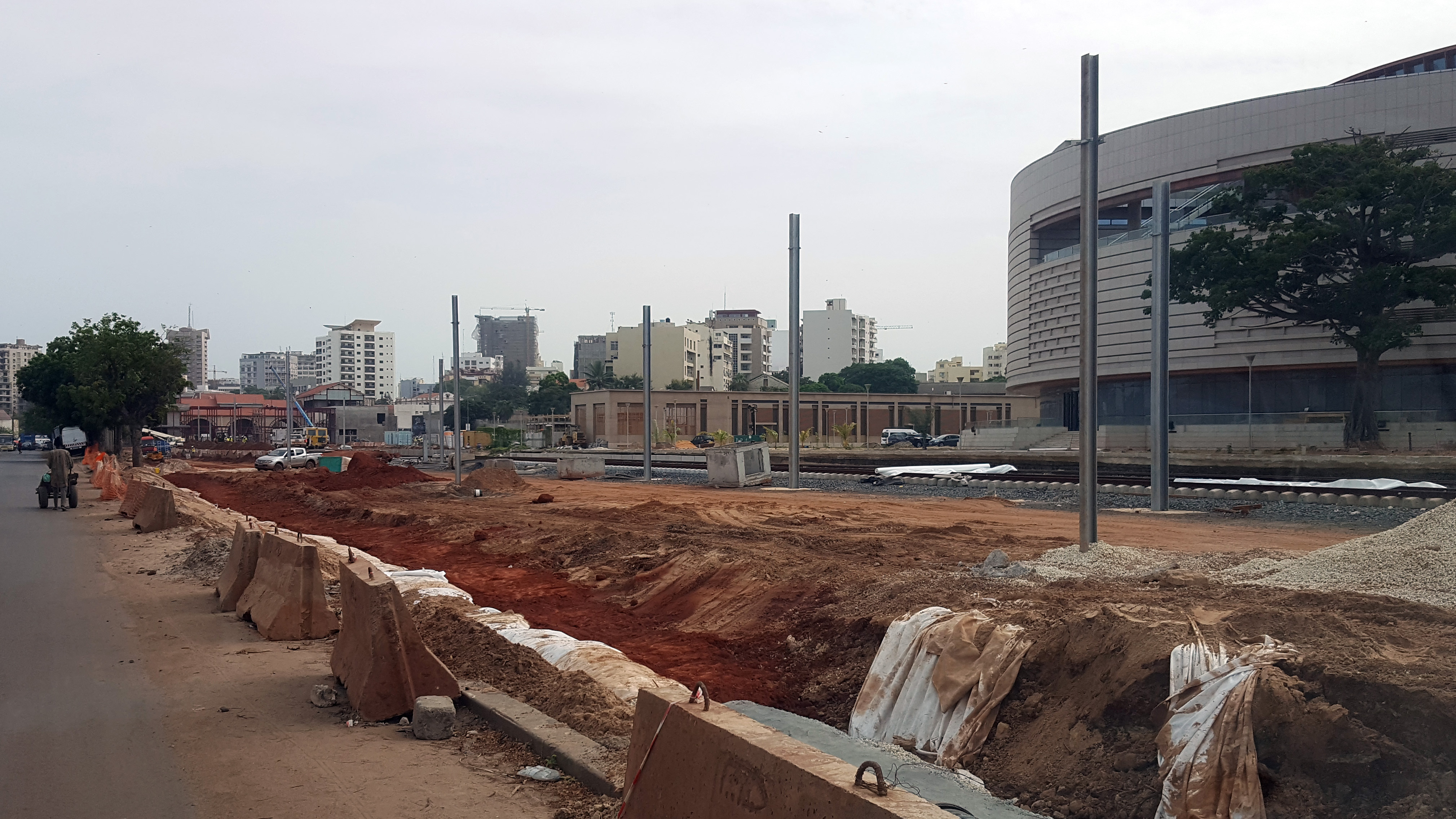 Travaux de voie du TER Dakar-AIBD avec vue sur l'arrière de la gare de Dakar, prise depuis le boulevard de l'Arsenal.